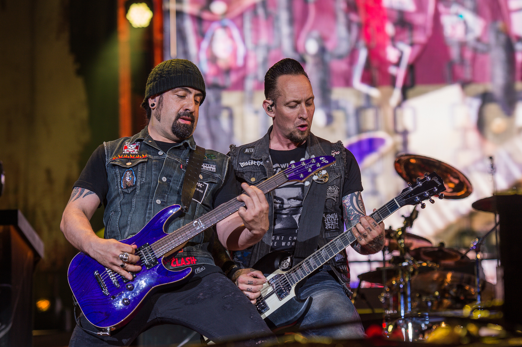 ARGO-Konzerte,Festival,Konzert,Livekonzert,Livemusik,Michael Schøn Poulsen,Musik,RiP,Rob Caggiano,Rock im Park 2016,Seat Zeppelin Stage,Volbeat